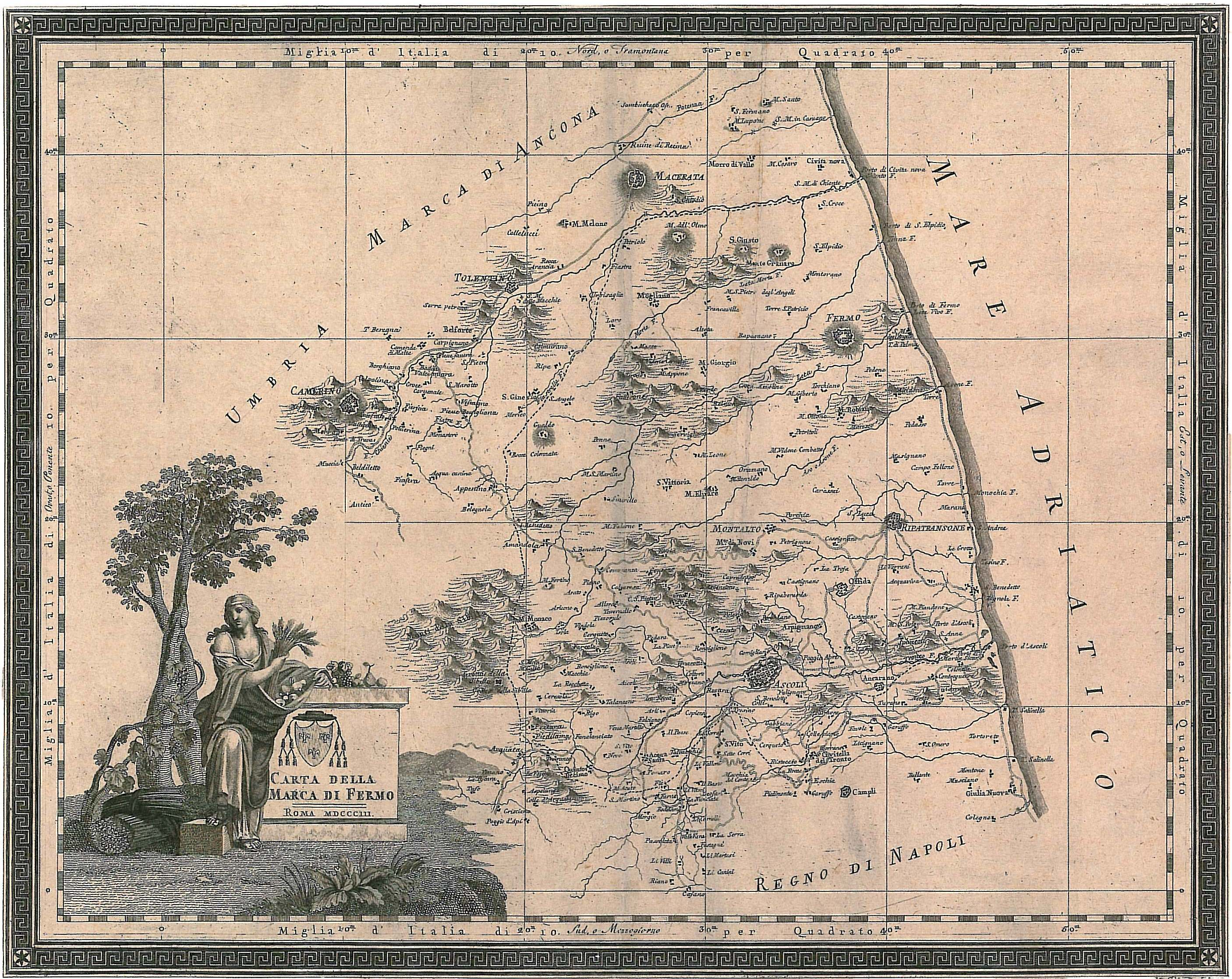 Carta della Marca di Fermo dopo la sottrazione dei territori a sud del fiume Tronto, nel 1080, Roma 1803 - Bernardino Olivieri (Cartoteca storica delle Marche)